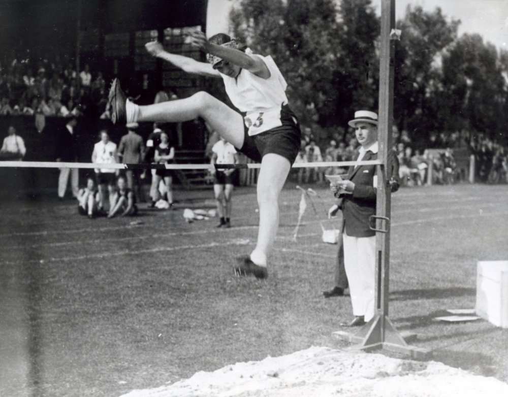 Carolina Anna (Lien) Gisolf evenaart het wereldrecord hoogspringen van 1.60,8 meter, tijdens de Nationale atletiek-kampioenschappen voor vrouwen op het A.A.C.-terrein te Leiden 1 september 1929.